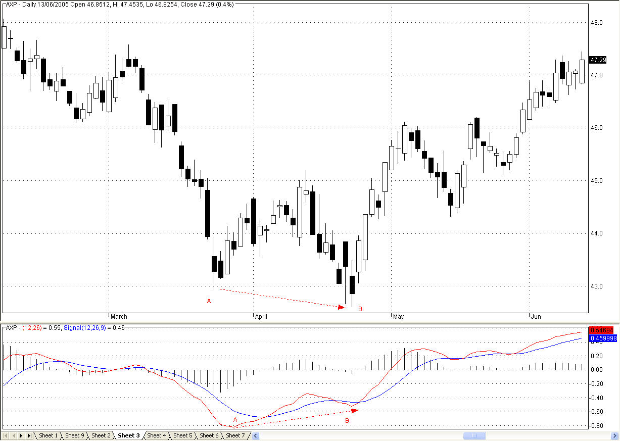 Esta imagen la hice yo utilizando AmiBroker.